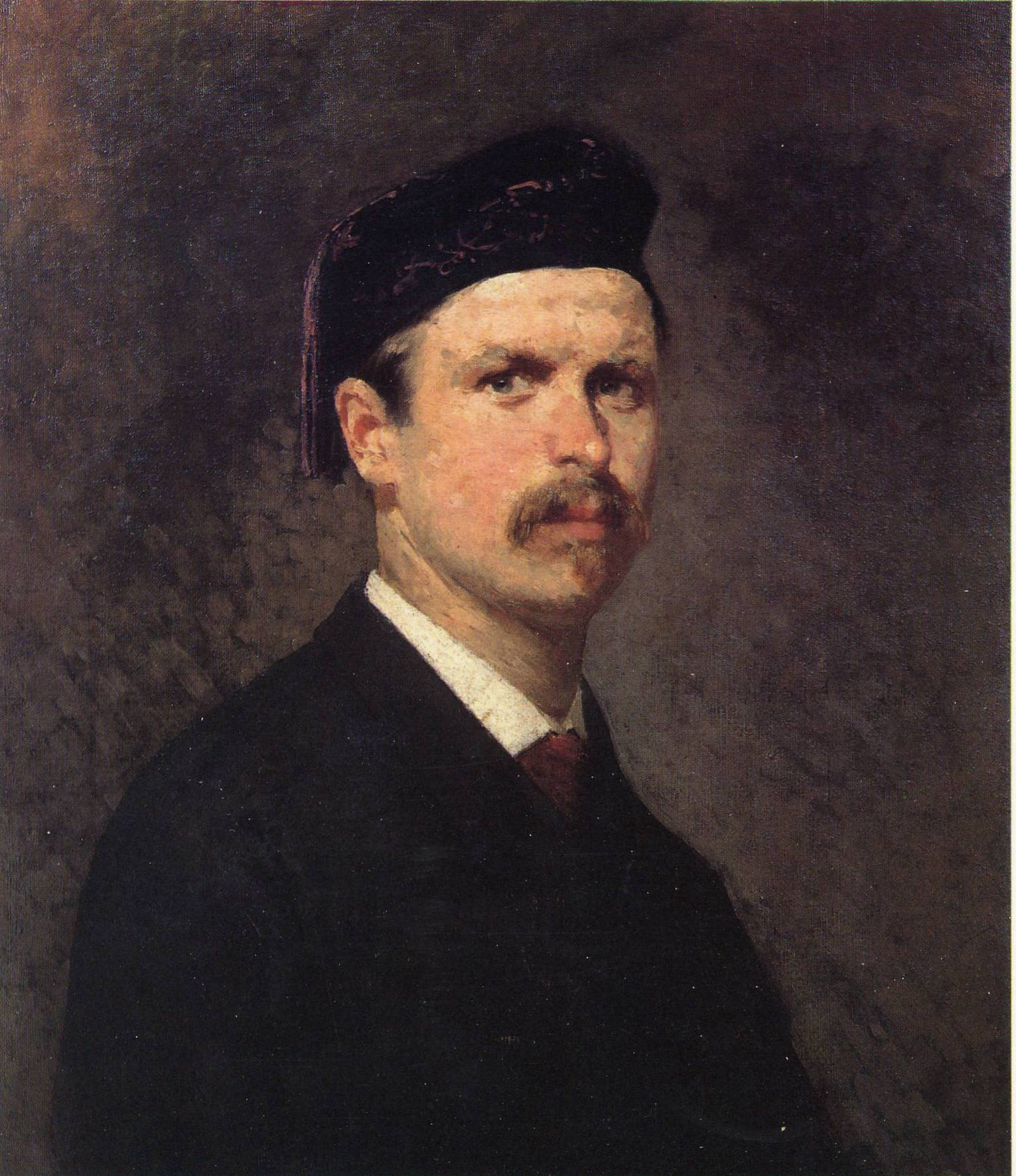 "Autoritratto", olio su tela, 65 x 50, Pinacoteca David Beghè, Calice al Cornoviglio